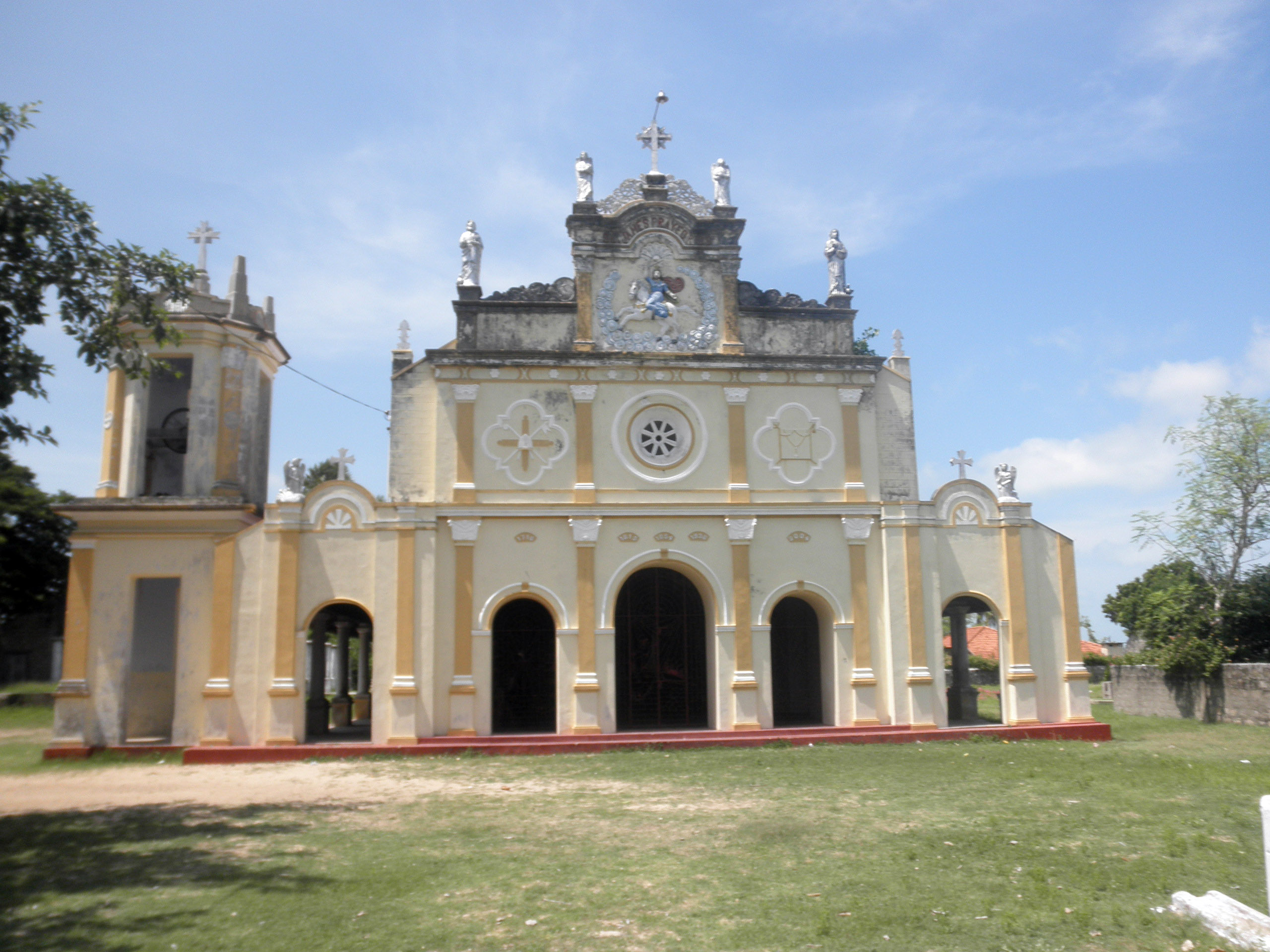 St. James' church; Kayts, Sri Lanka